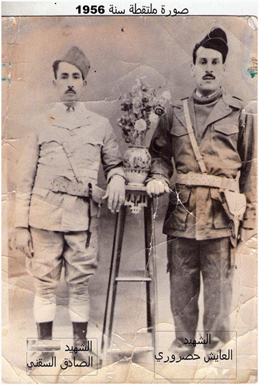 الشهيد حصروري العايش على اليمين رفقة الشهيد الصادق السقني على اليسار